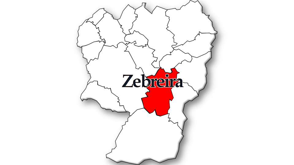 População